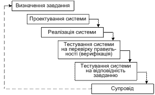 Иллюстрация_3_до_статьи_програмная_инженерия